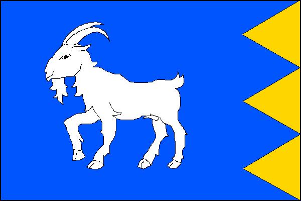 Vlajka obce Košařiska